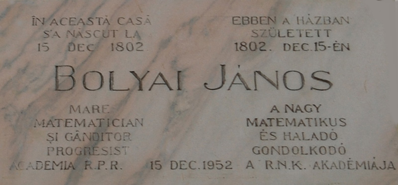 Emléktábla Bolyai János kolozsvári szülőházán, felavatva 1952-ben